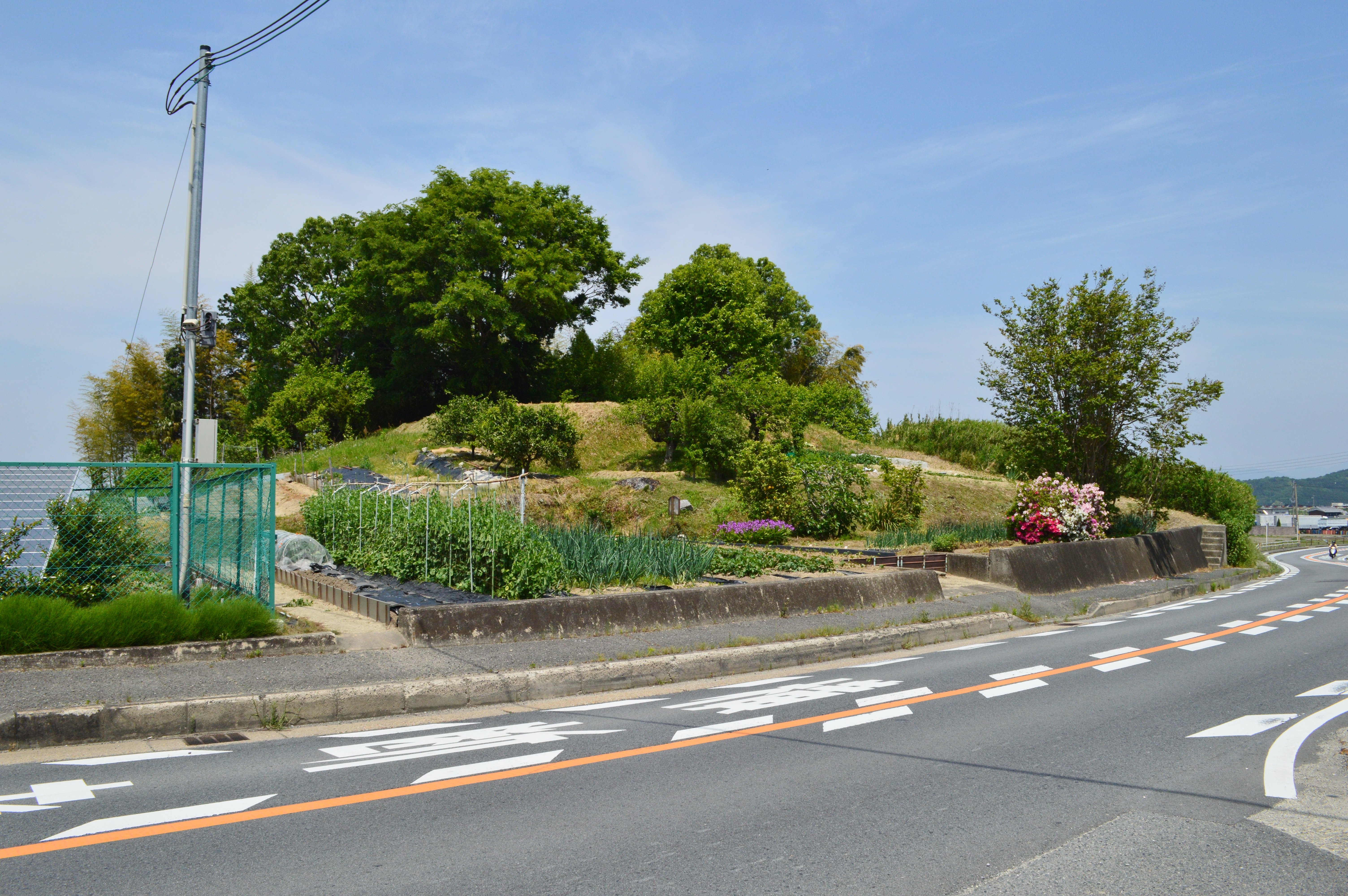 室宮山古墳 陪塚ネコ塚古墳